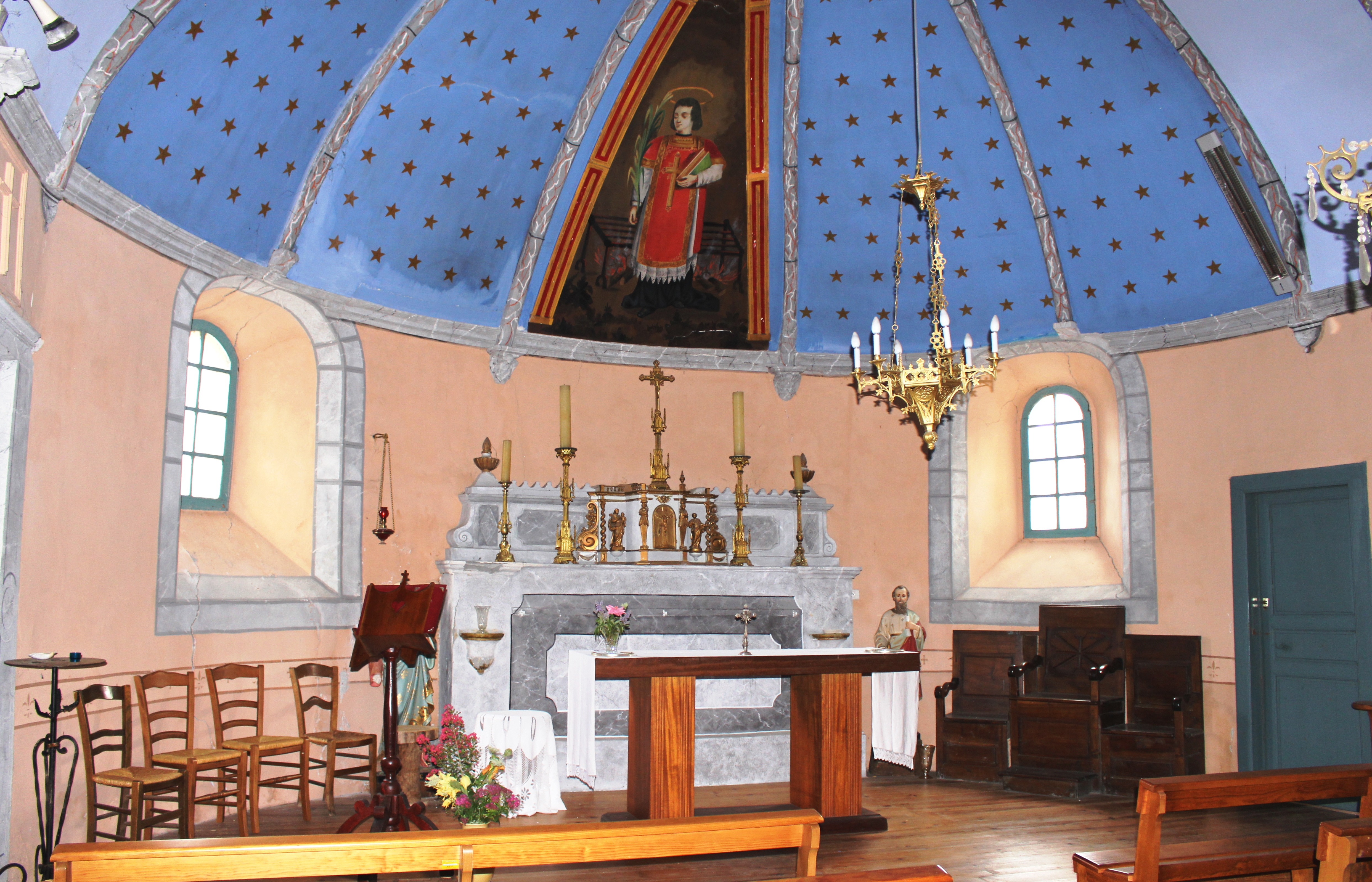 Église Saint-Laurent de Balagnas (Hautes-Pyrénées)